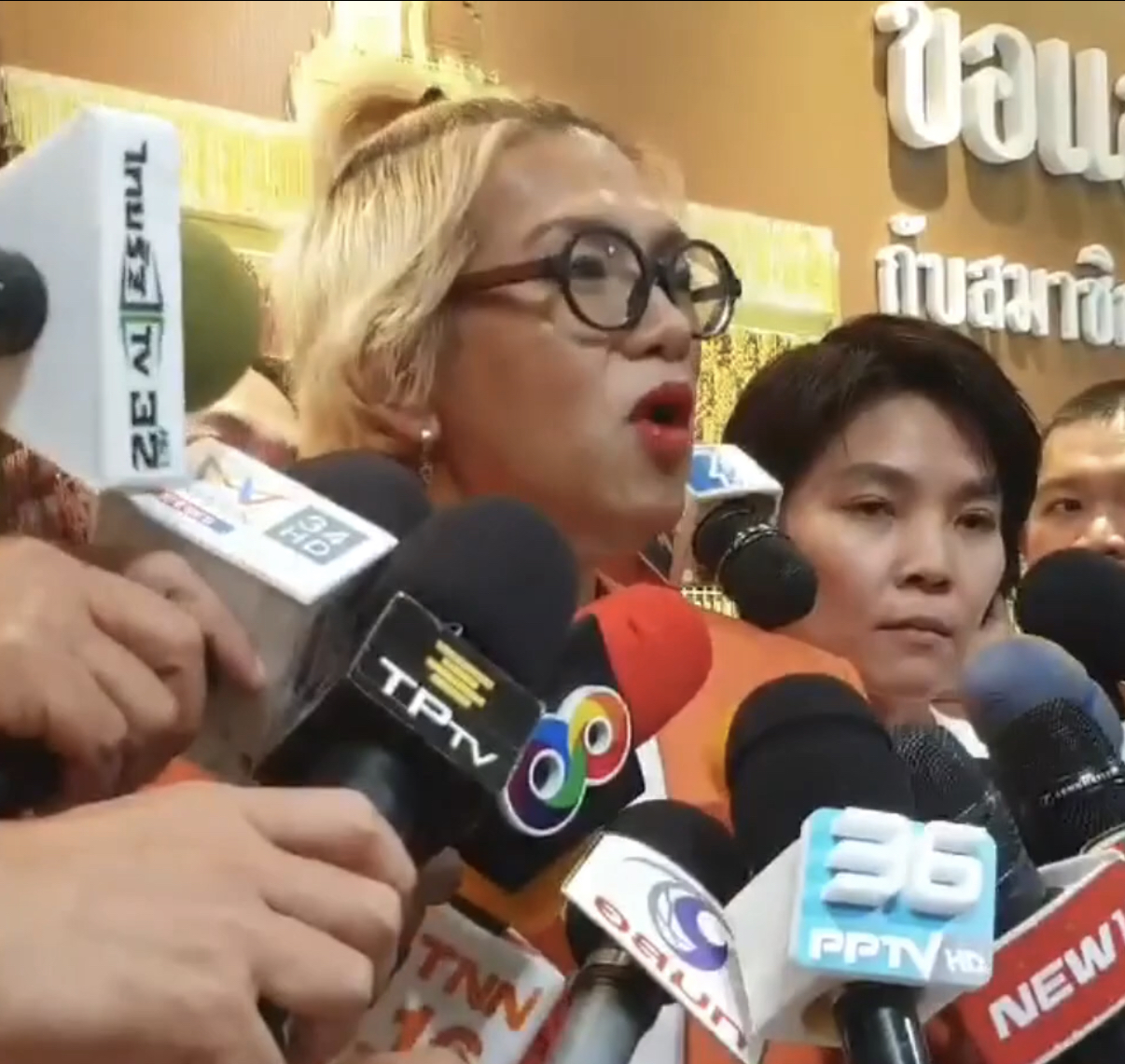 ธัญญ์วาริน สุขะพิสิษฐ์